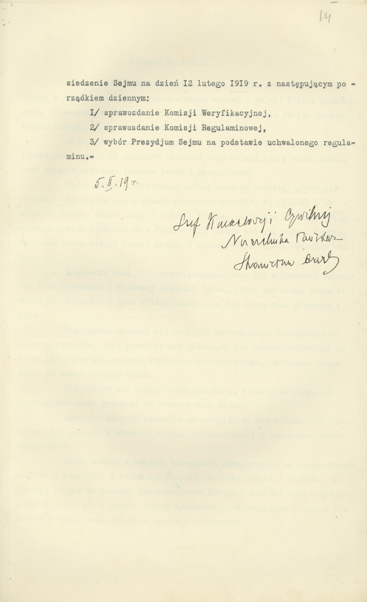 Porządek uroczystości otwarcia Sejmu Ustawodawczego